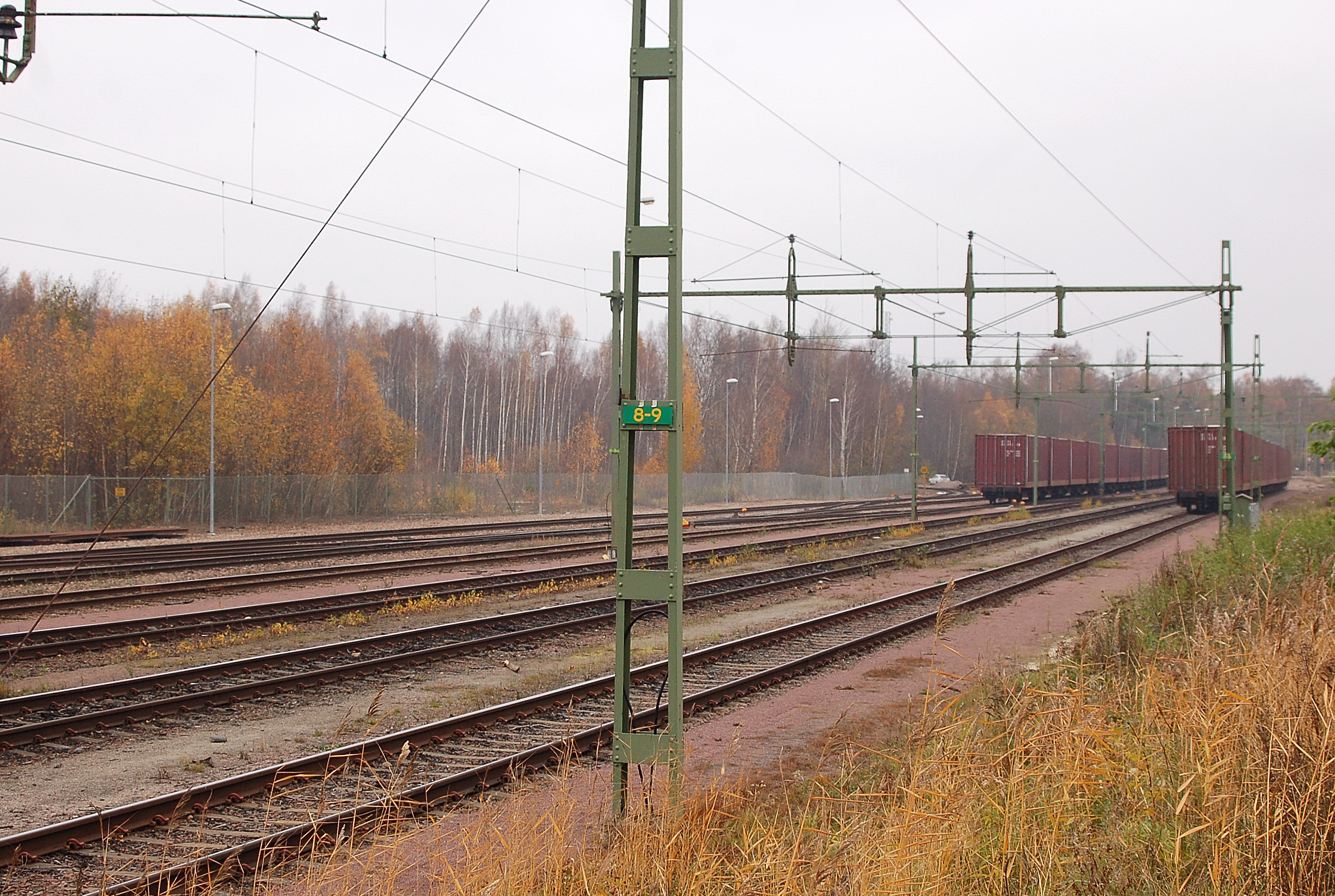 Norra delen av bangården vid Skoghalls station.